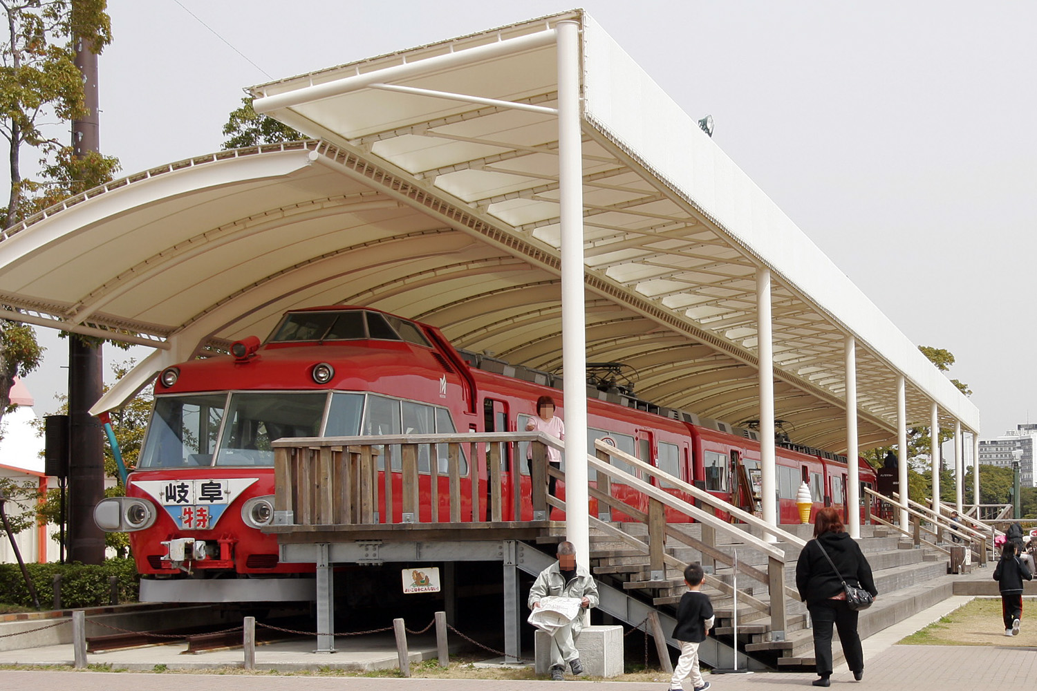 中京競馬場パノラマステーション